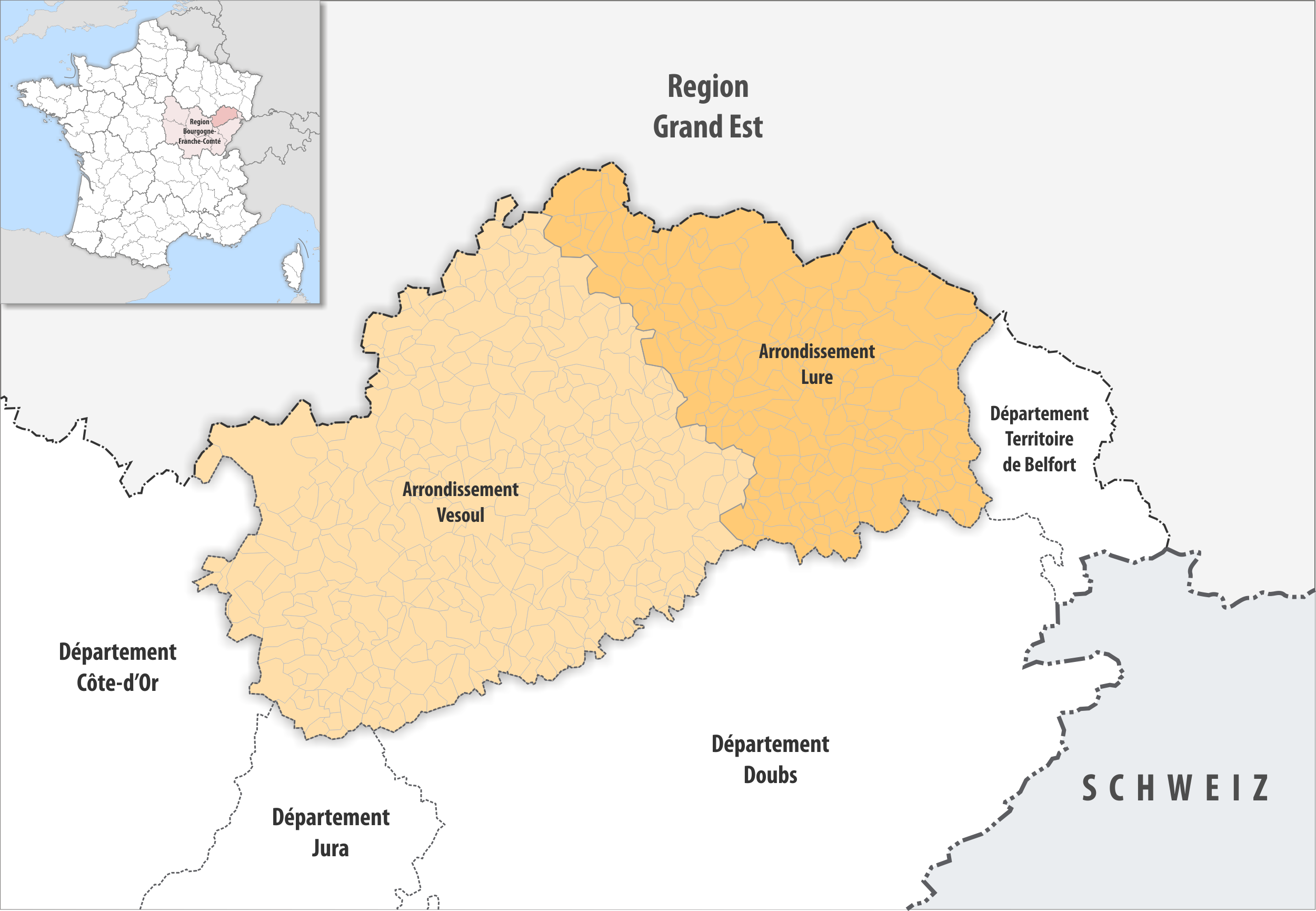 Gemeinden und Arrondissemente im Departement Haute-Saône